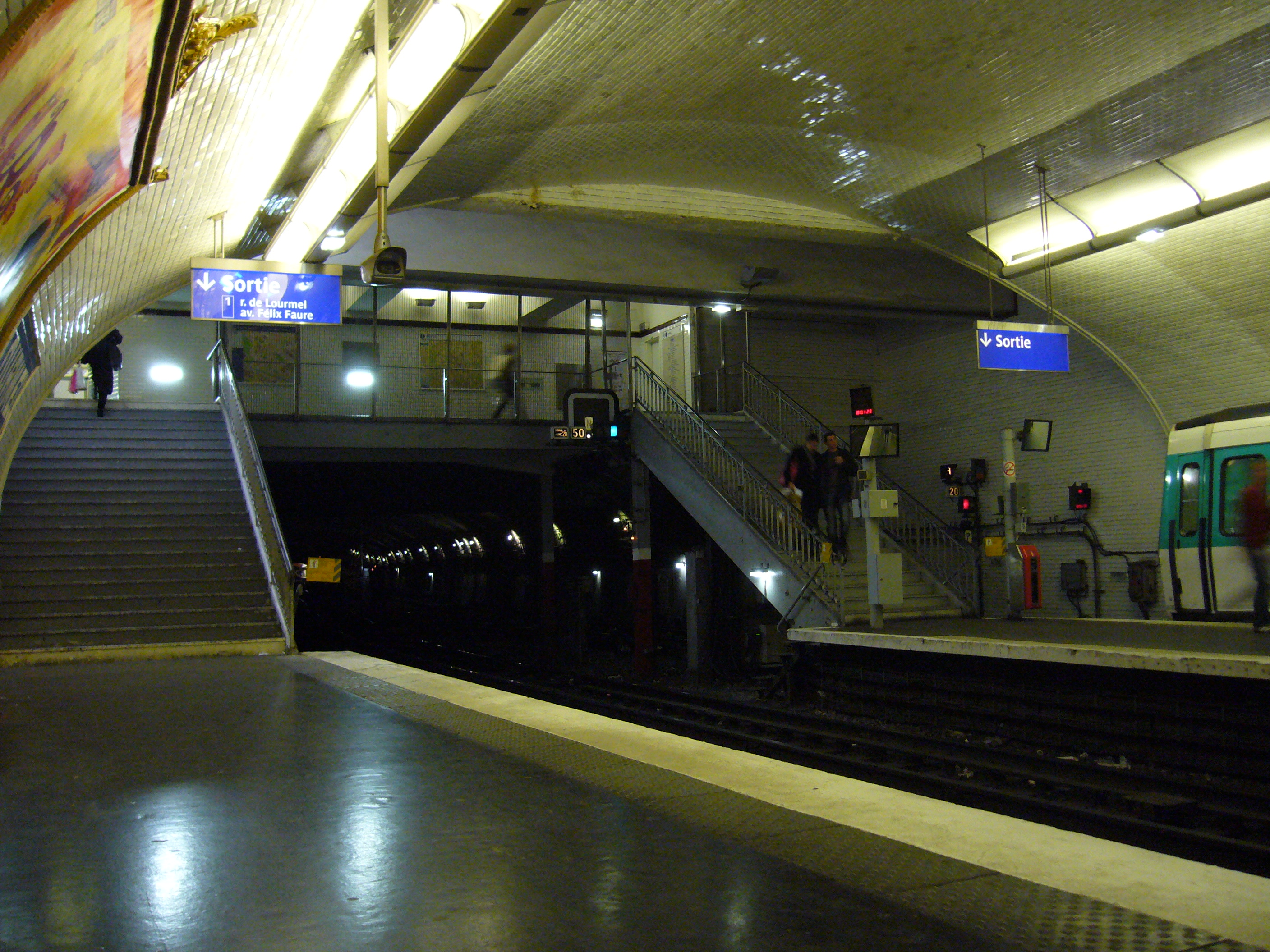 Vue de l'accès aux quais de la station Lourmel sur la ligne 8 du métro de Paris.